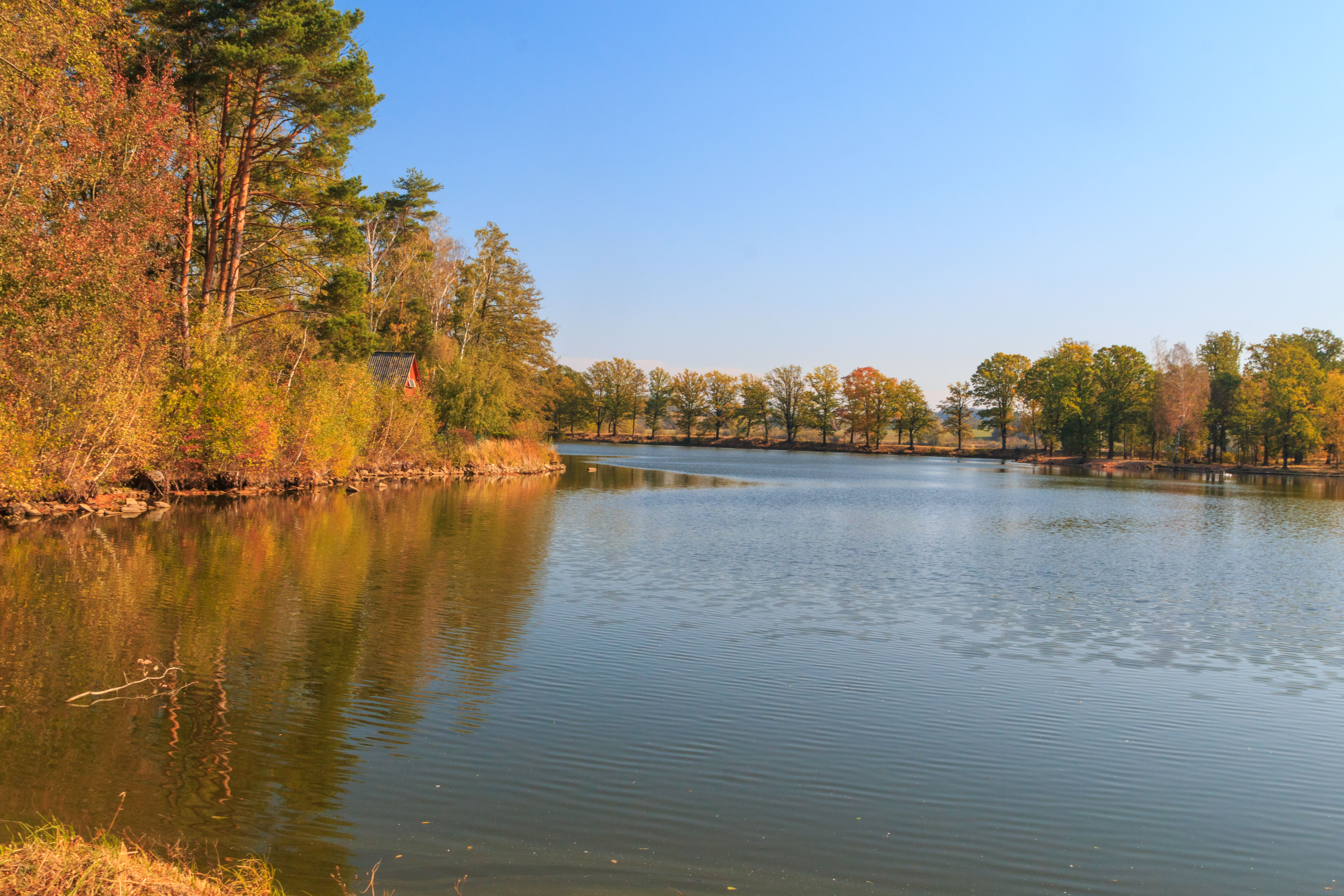 rybník Žďár u Smrčku Project: Vodstvo. Ticket: 1617.